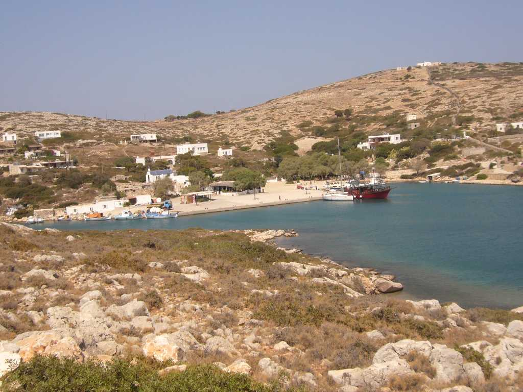 Hafen auf Arki